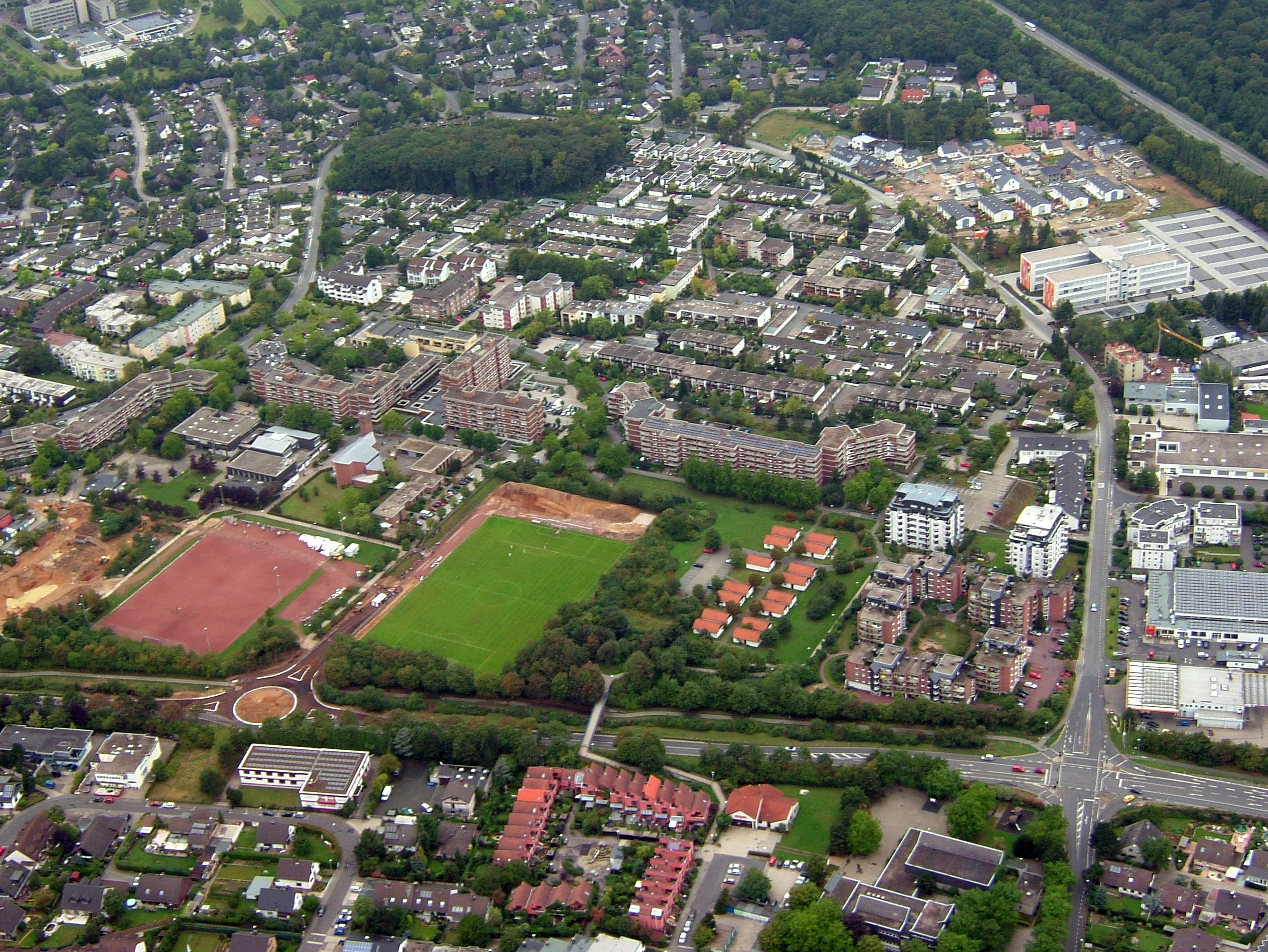 Merl / Steinbüchel 2011 vor Bebauung der Sportflächen, Luftbild aus südöstlicher Richtung